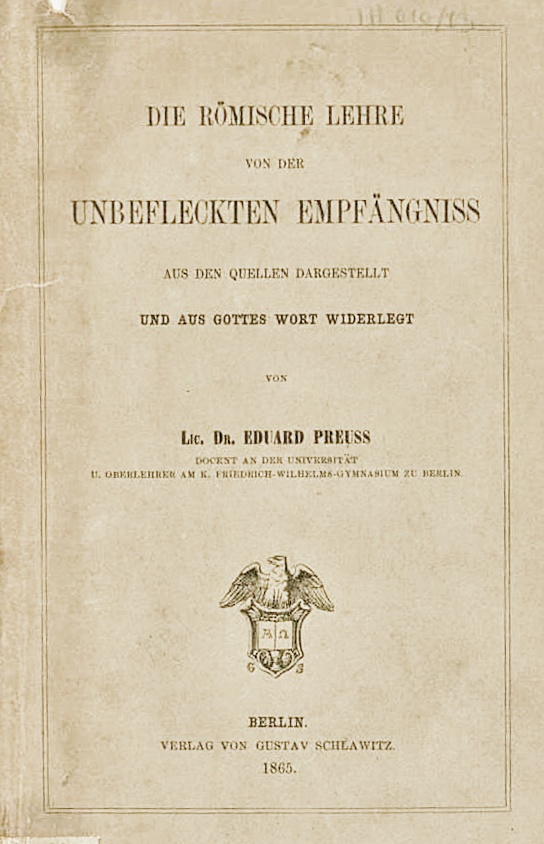 Buchtitel, Eduard Preuss (1834-1904) deutsch-amerikanischer Theologe und Publizist